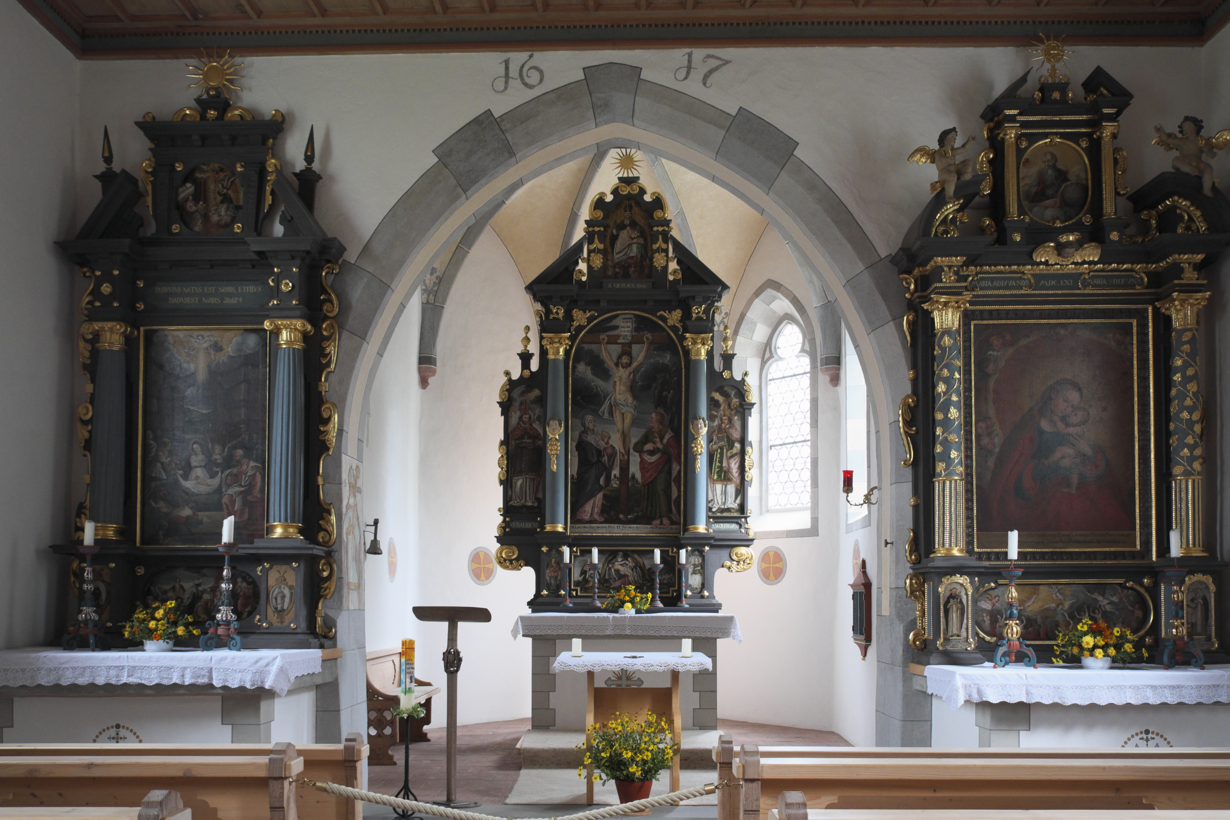 Katholische Filialkirche St. Nikolaus in Oberkirch (Füssen) im Landkreis Ostallgäu (Bayern/Deutschland), Innenraum